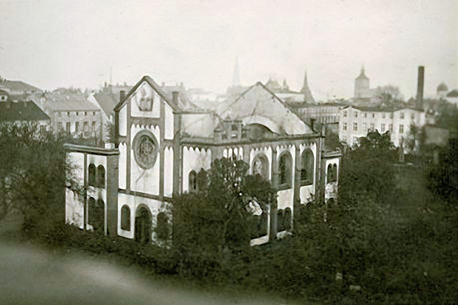 Bild von der ausgebrannten Synagoge Rostocks in der Augustenstraße, vermutlich Frühjahr 1939. Das Original von Hans-Peter Weißflogs Schwiegervater wurde als Spende dem Stadtarchiv Rostock überlassen und ist gemeinfrei.